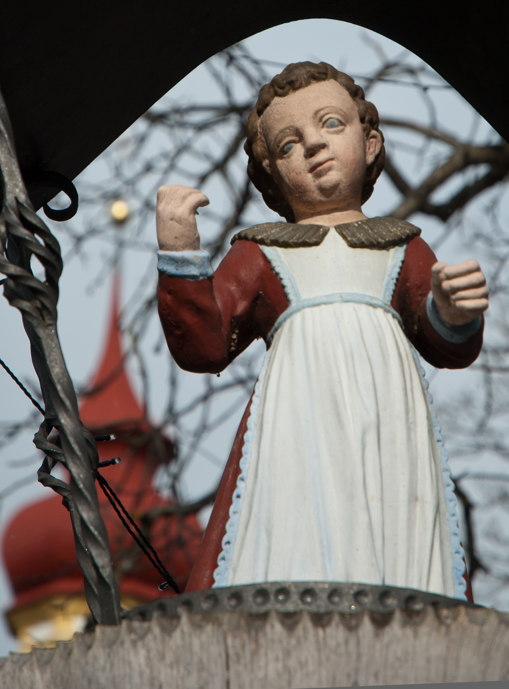 Skulptur des Anderl von Rinn (Andreas Oxner) auf einem Brunnen vor der Kirche von Judenstein